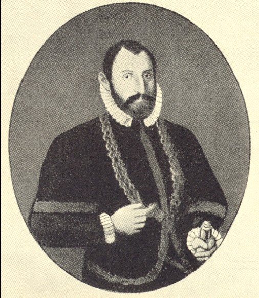 Porträt Graf Ludwigs des älteren von Sayn zu Wittgenstein (Stich nach einem Gemälde im Berleburger Schloss)